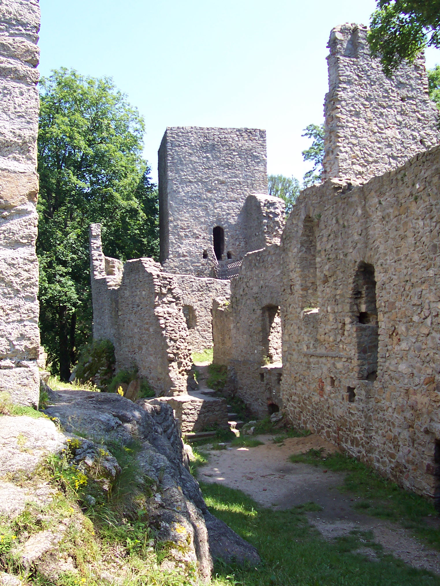 Ruiny hradu Choustník / Ruins of castle Choustník